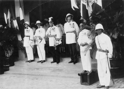 Foire-exposition de Porto Novo (Dahomey), 14, 15, 16 juillet 1931. La tribune d'honneur pendant le défilé des troupes ayant précédé l'inauguration de la foire. De gauche à droite : Le commandant d'armes, M. le secrétaire général Geay, M. le gouverneur Tellier, l'administrateur maire de Porto-Novo.